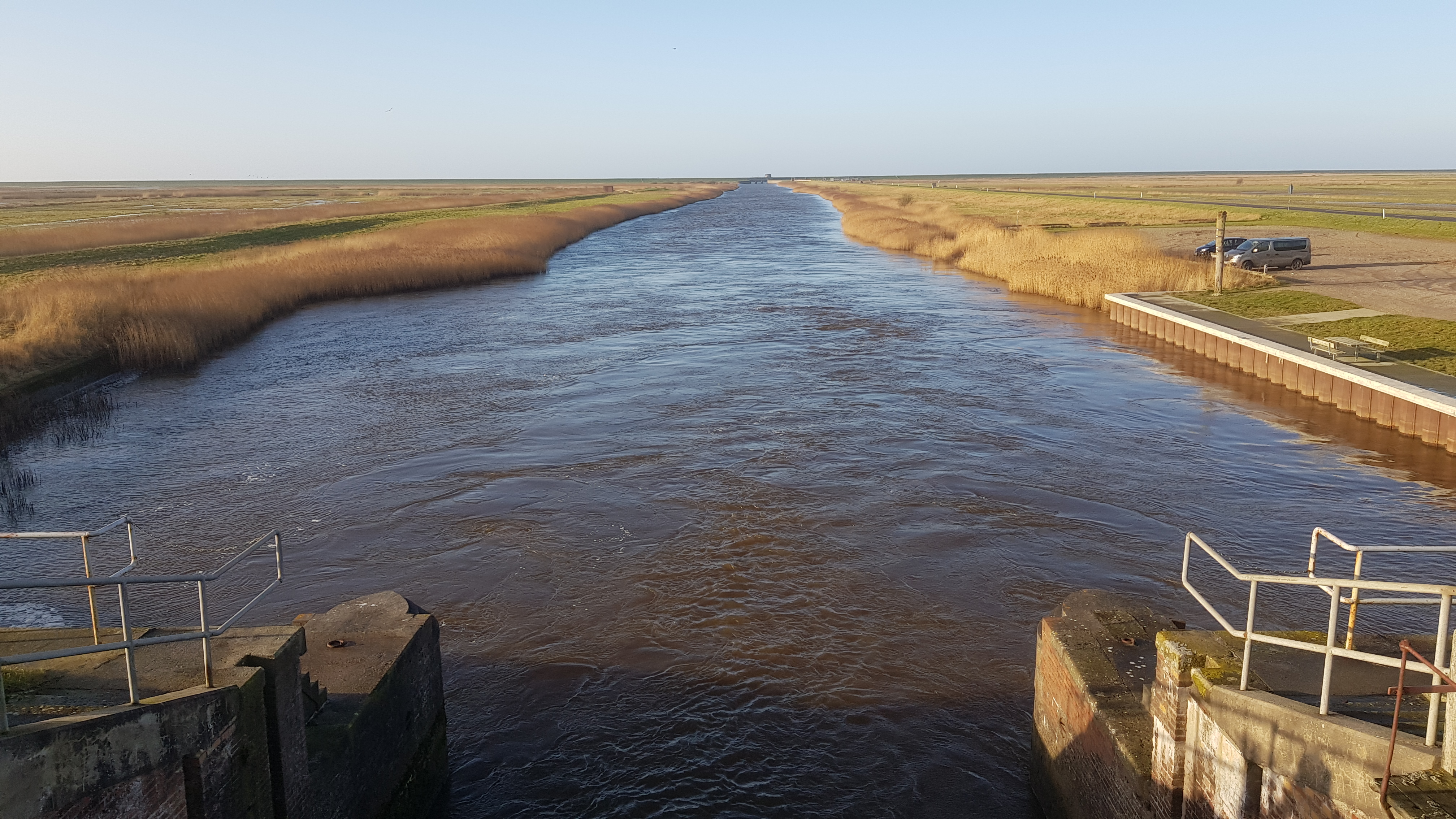 Vidåen set fra Højer gamle Sluse i retning af den nye